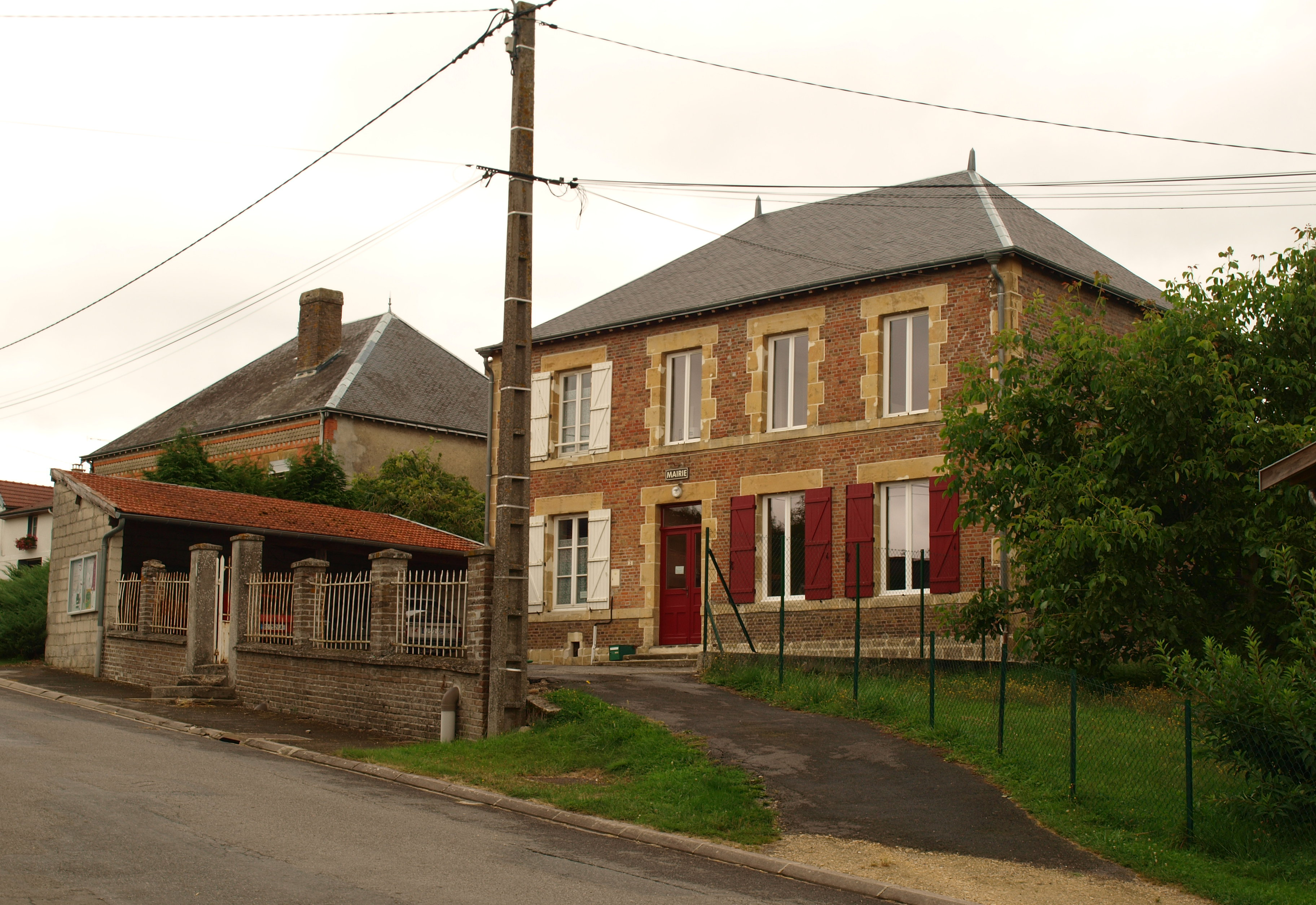 Mouron (Ardennes, France) ; église